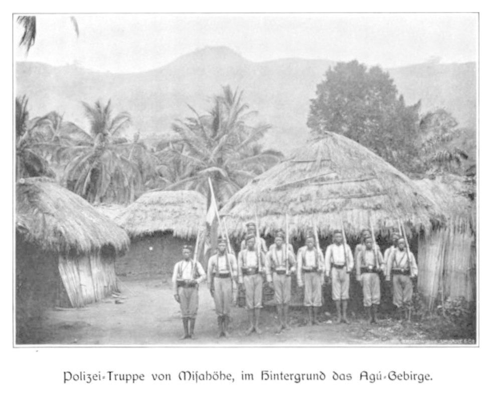 Parade der Polizeitruppe von Misahöhe